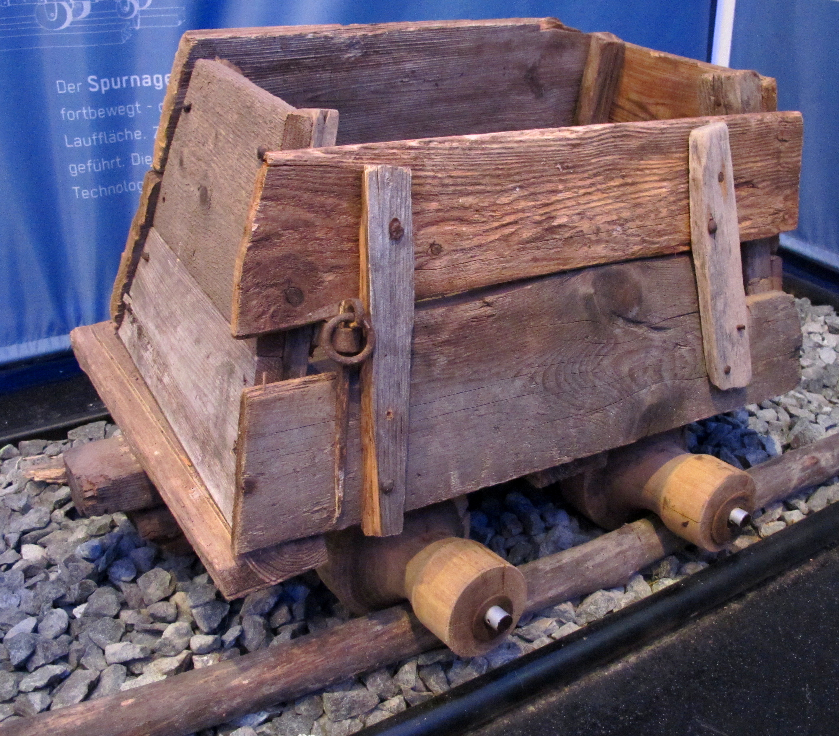 Siebenbürgischer Förderwagen, sogenannter Spurnagelhunt od. Deutsche Hunt. Ausgestellt im Südbahnmuseum Mürzzuschlag Diese Bauform wurde im siebenbürgischen Goldbergbau der Apostelgrube bei Bŕad/Tannenhof Anfang des 16. Jahrhunderts eingesetzt. Eine Längseite des hölzernen Förderwagens ist zur Entleerung abnehmbar. Die Holzräder der Hunte waren mit einer gewölbten Lauffläche versehen und wurden auf gleisförmig zugerichteten Baumstämmen (="Riegeln") fortbewegt. Diese Bauform stellt eine Vorstufe zur Entwicklung der Rad-Schiene-Technik, die ihre Fortsetzung bei der Eisenbahn fand, dar.